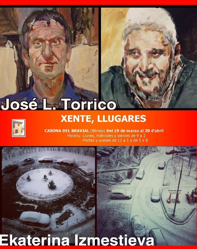 Esposición de pintura de José Luis Torrico